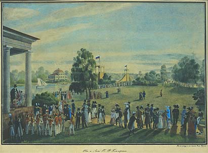 Петербург. Гуляние на Крестовском острове. 1822 г. Автолитография.